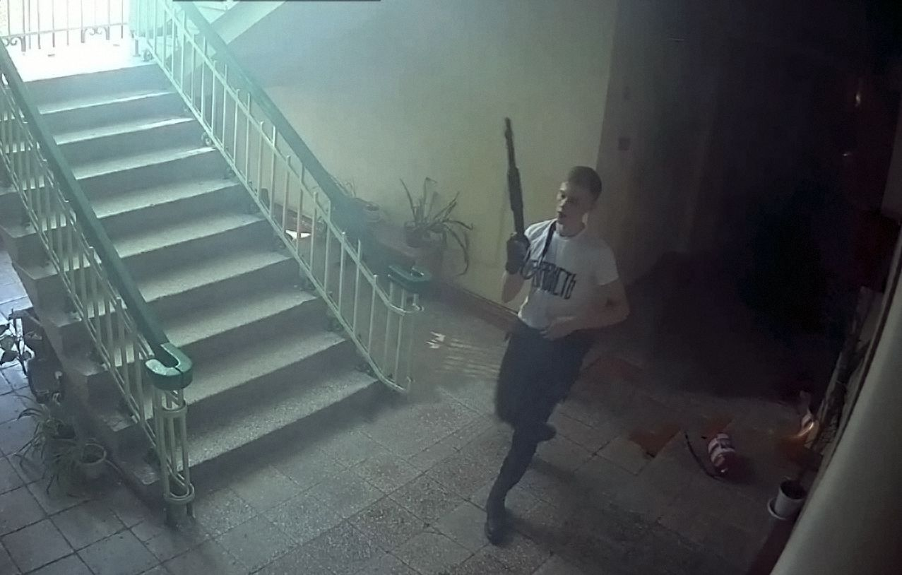 Vladislav Roslyakov kuvattuna koulun sisällä